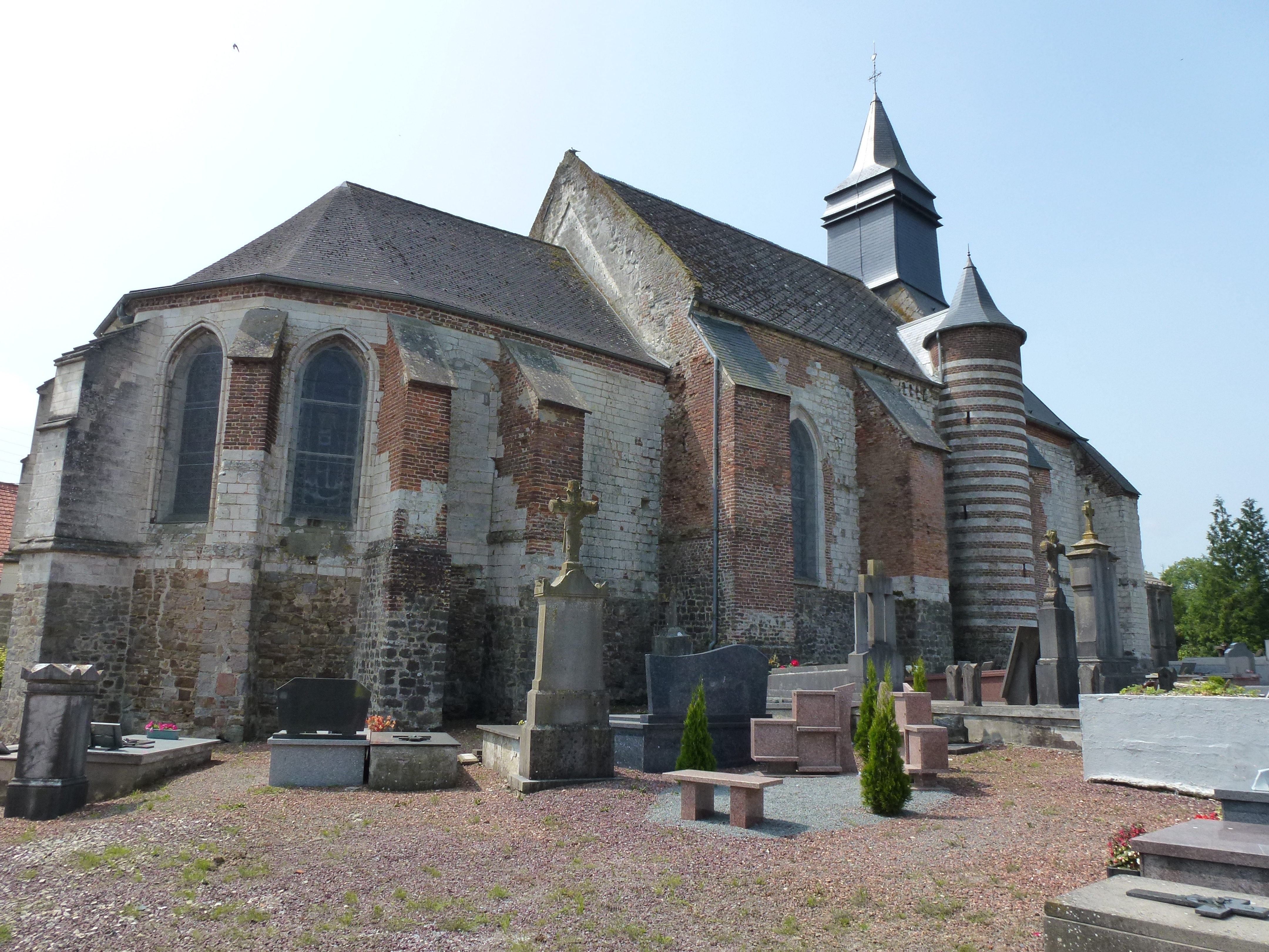 Senlis (Pas-de-Calais, Fr) église Notre- Dame PA00108430 vue latérale .